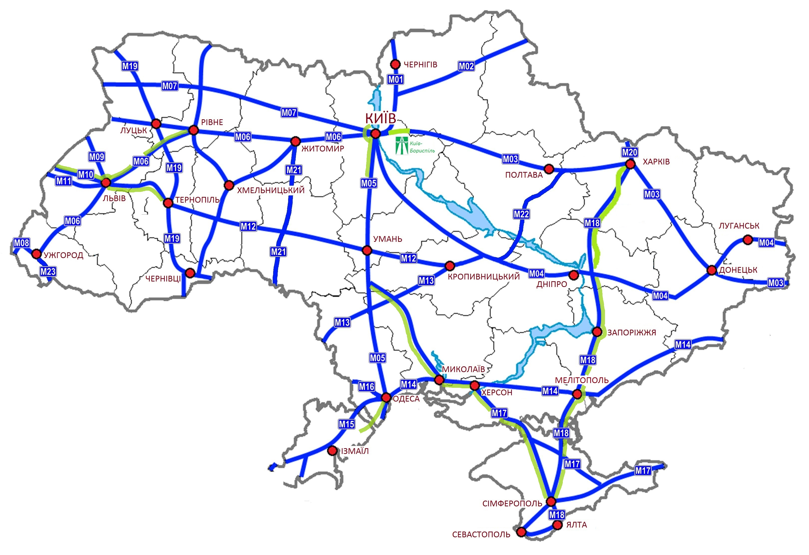 Платні дороги в Україні (проекти)